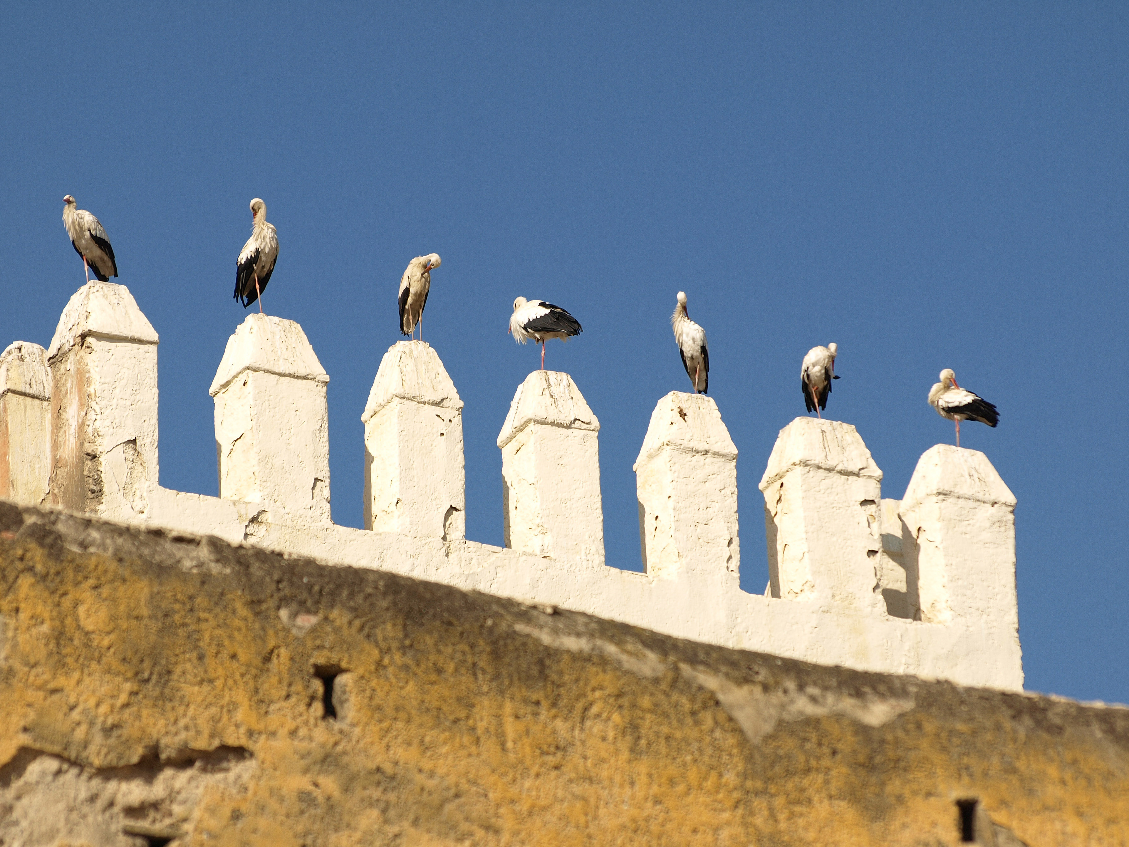 Weißstorch im Oktober in Marokko